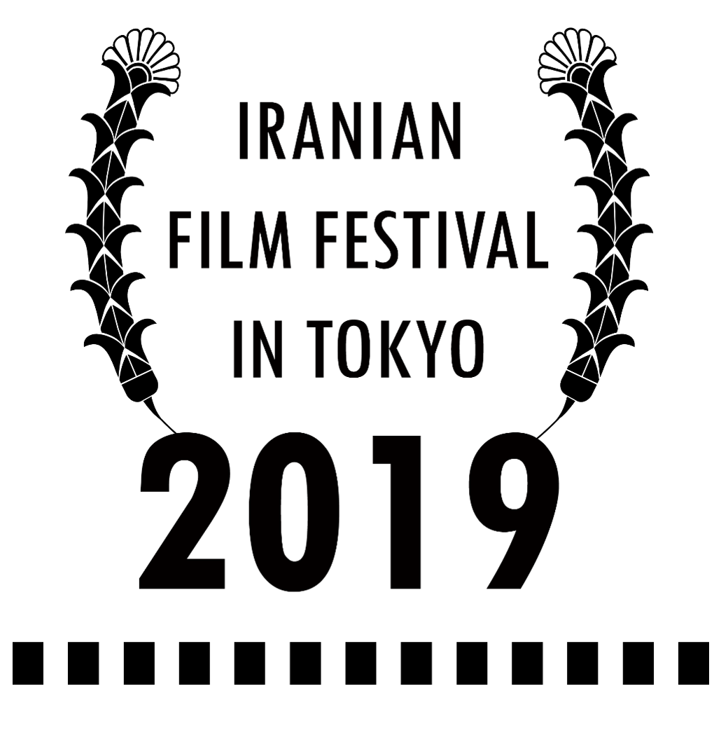 イラン文化センターにより毎年開催される東京イラン映画祭２０１９のロゴマーク